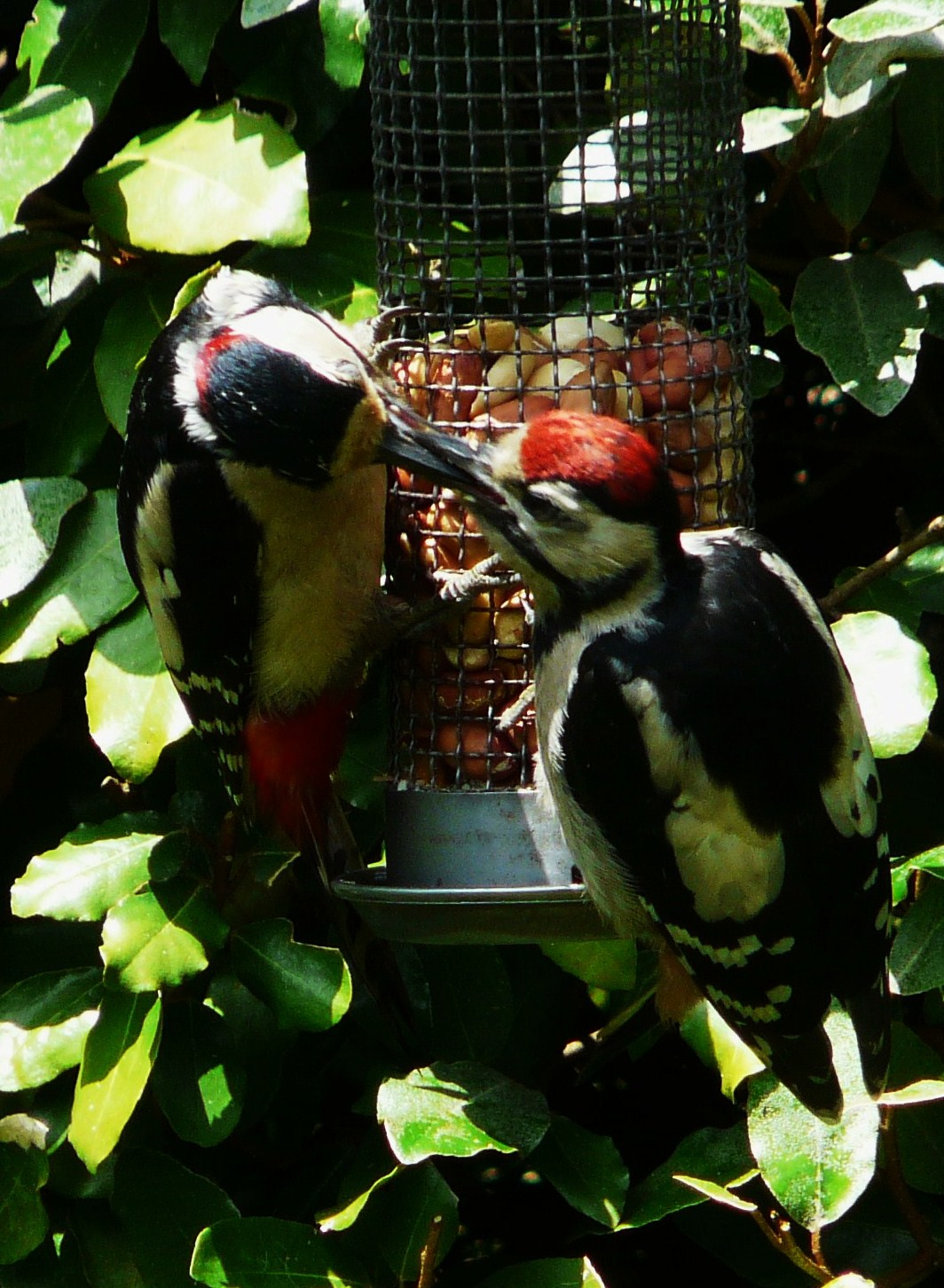 Pic épeiche mâle (à gauche) donnant la becquée à son juvénile, Périgueux, Dordogne, France.